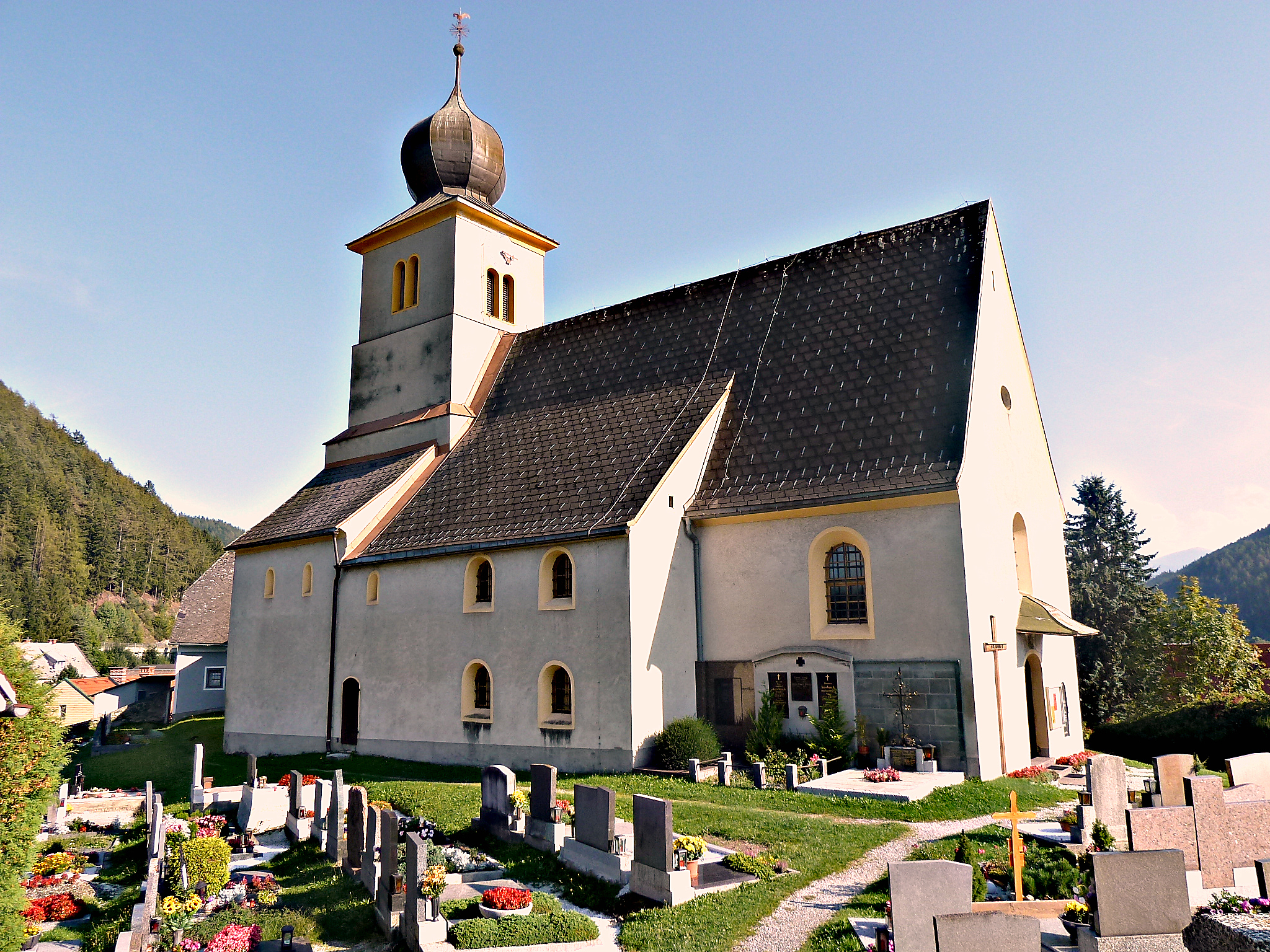 Pfarrkirche Traboch